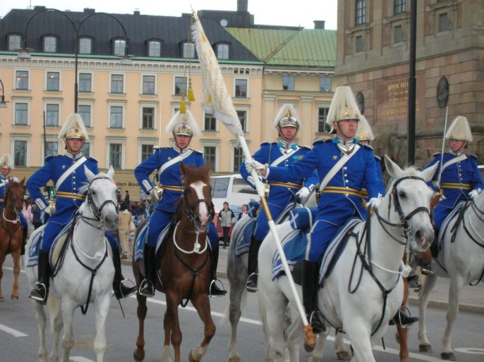 Berida högvakten - The Royal Mounted Guards - at Skeppsbron